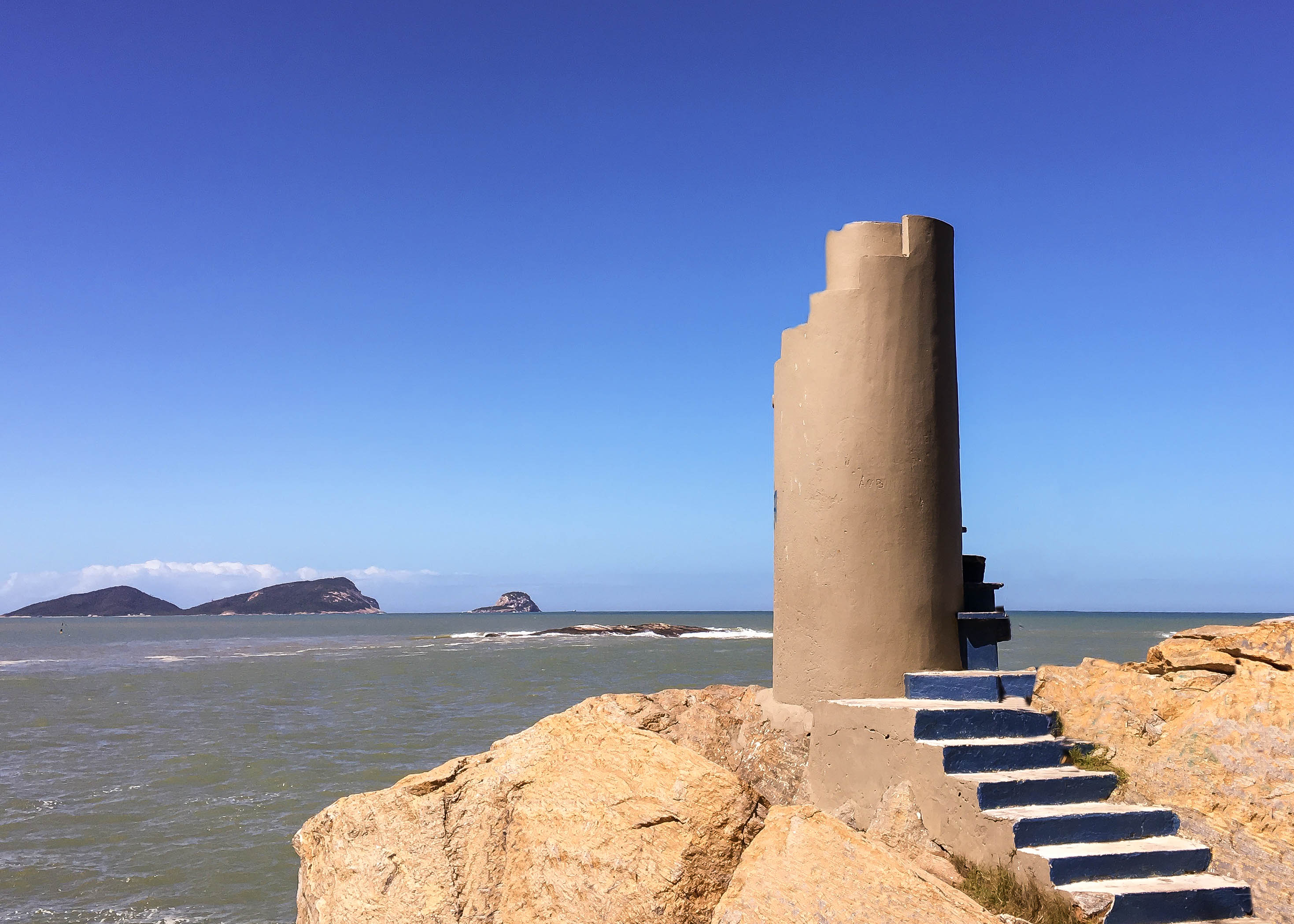 Ruínas do antigo farol de Macaé-RJ